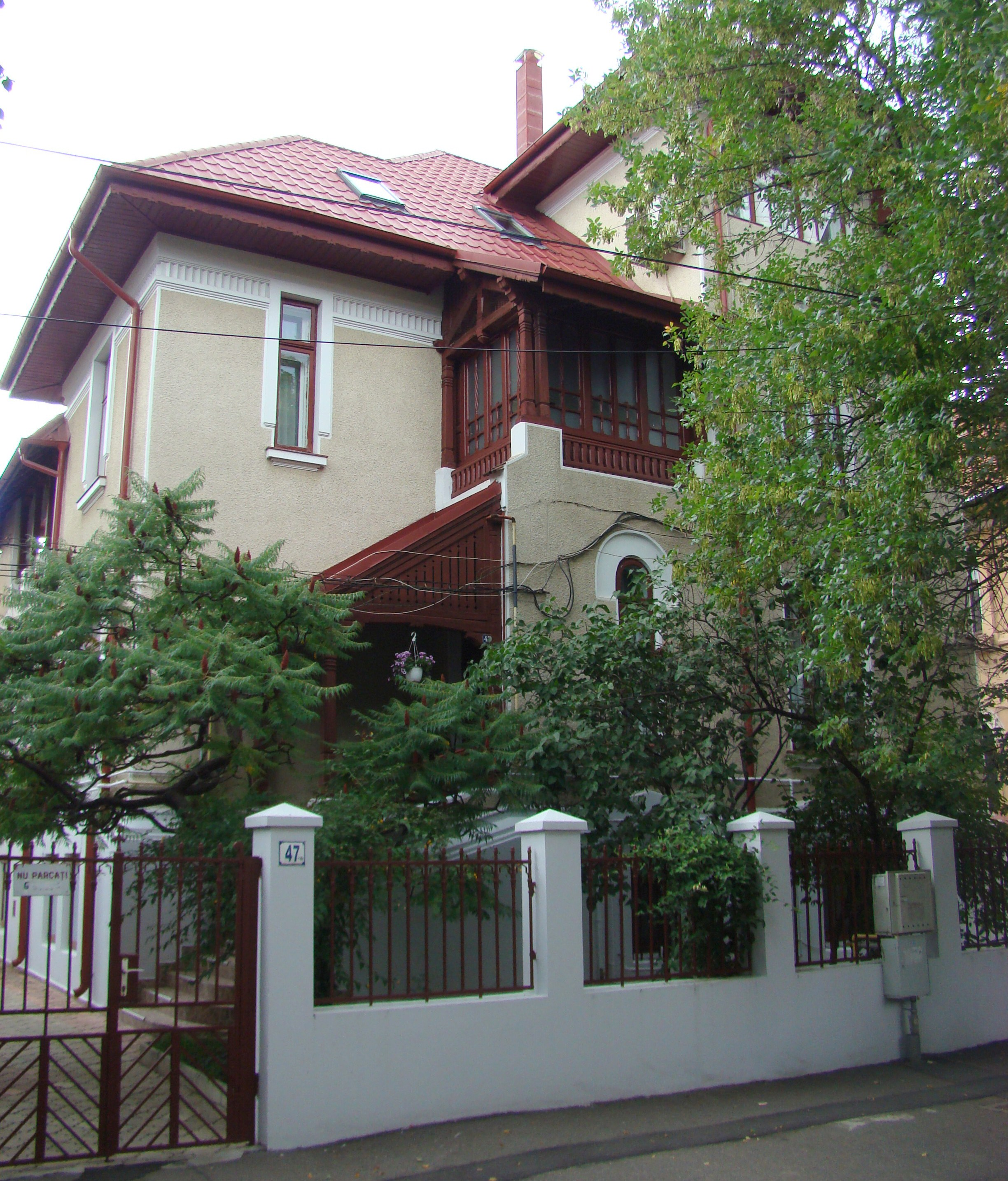 Casă monument istoric, str.Londra, nr.47